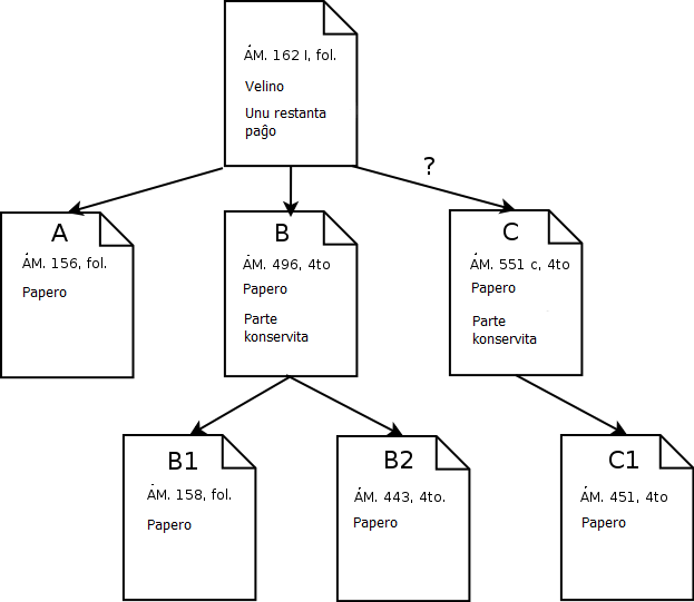 Filologia skemo de la sagao de Hrafnkell. Tradukita el la franca.